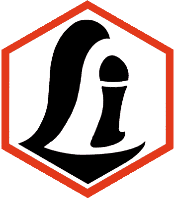 Logo des SV Lindenau 1848 e.V. bis 1945